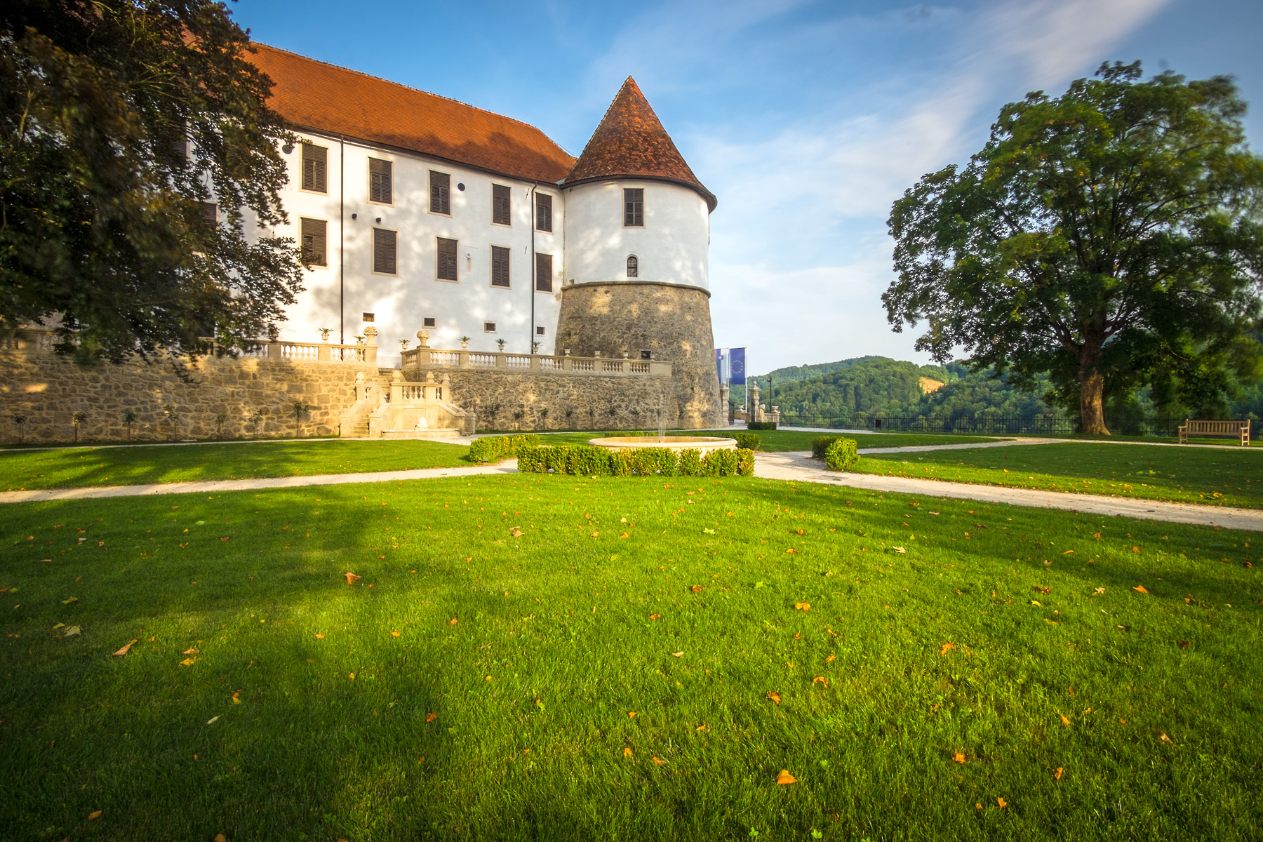 Rekonstruiran renesančni del grajskega parka